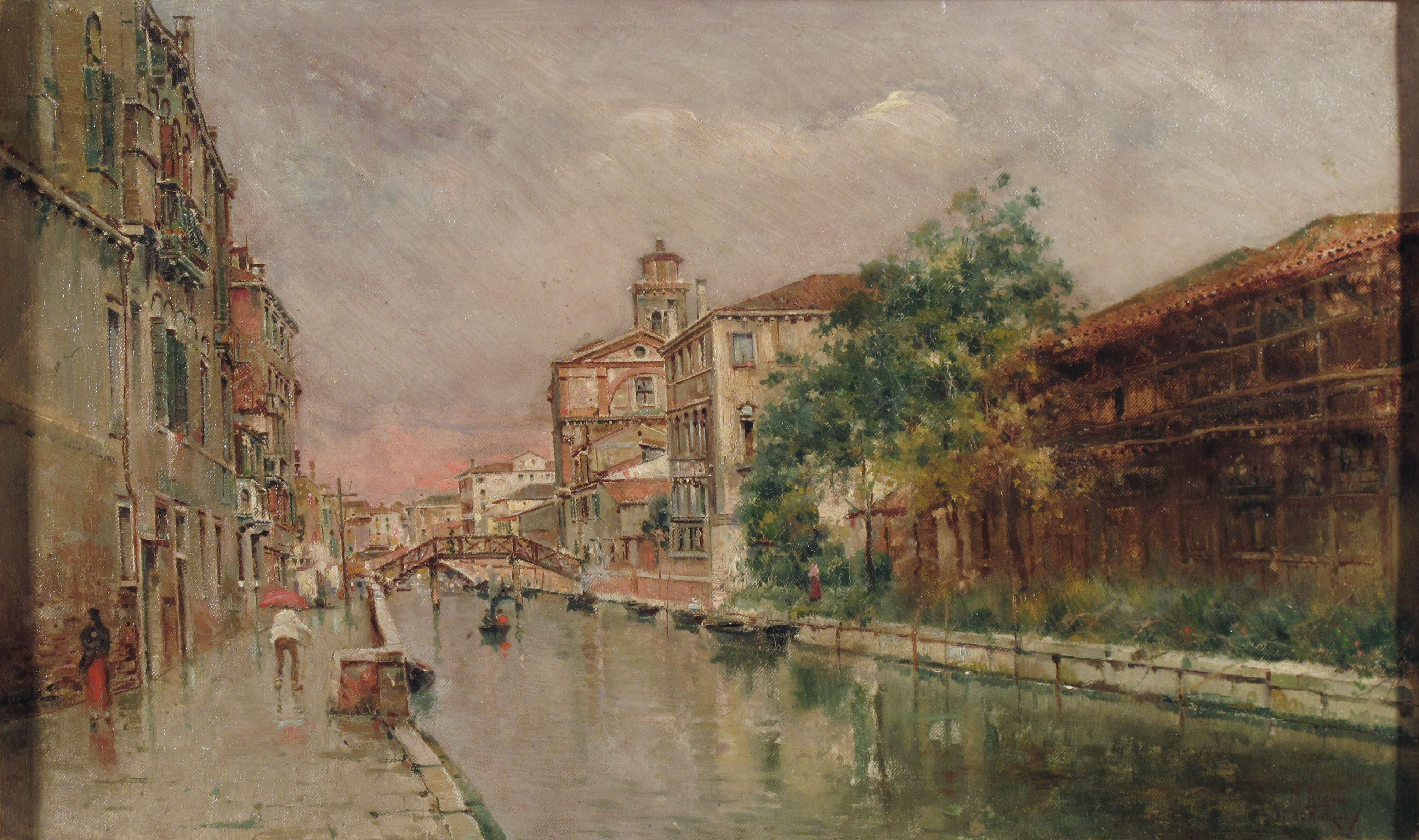 firmato in basso a destra - (Lucca, collezione Lorenzo Pacini)